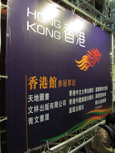 2005台北國際書展香港館參展單位標示帆布。第一代香港品牌被用作香港館的識別標誌。